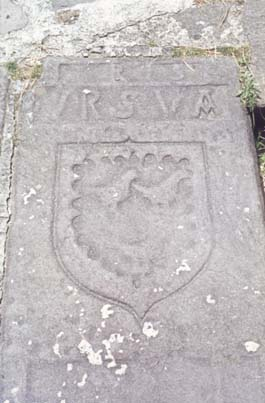 Arizkungo parroki-elizan dagoen hilarri batetan ikus daitekeen Ursuatarren armarria. Armarriak hiru uso beltz dauzka.